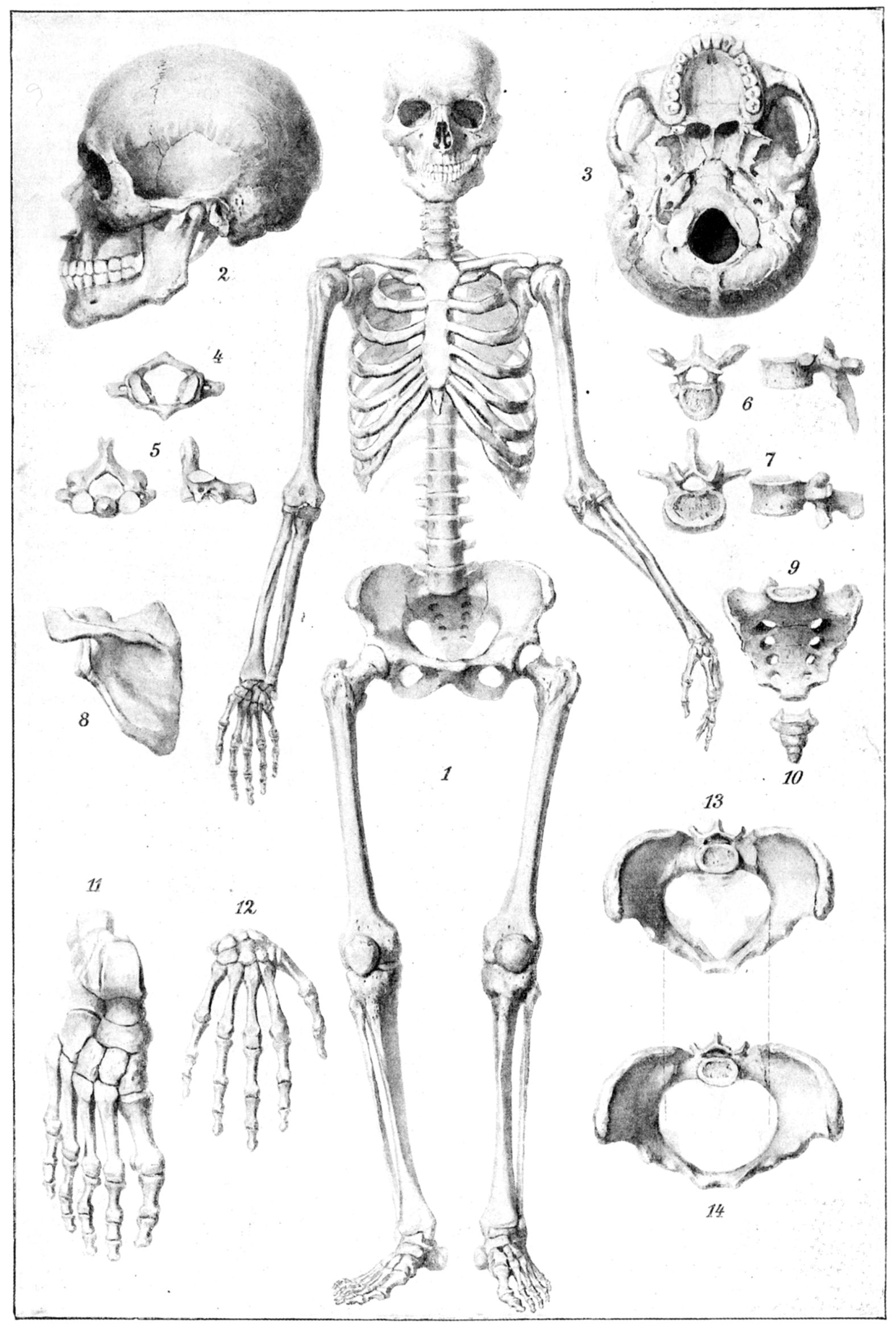 Skelett des Menschen. 1. Skelett von vorn. 2. Schädel, von links. 3. Schädelbasis. 4. Erster Halswirbel (Atlas), von oben. 5. Zweiter Halswirbel (Epistropheus), von oben und von der Seite. 6 Mittlerer Brustwirbel, desgl. 7. Vierter Lendenwirbel, desgl. 8. Schulterblatt, von hinten. 9. Kreuzbein, von vorn. 10. Steißbein, desgl. 11. Rechter Fuß, von oben. 12. Rechte Hand, desgl. 13. Männliches, 14. Weibliches Becken, von oben.